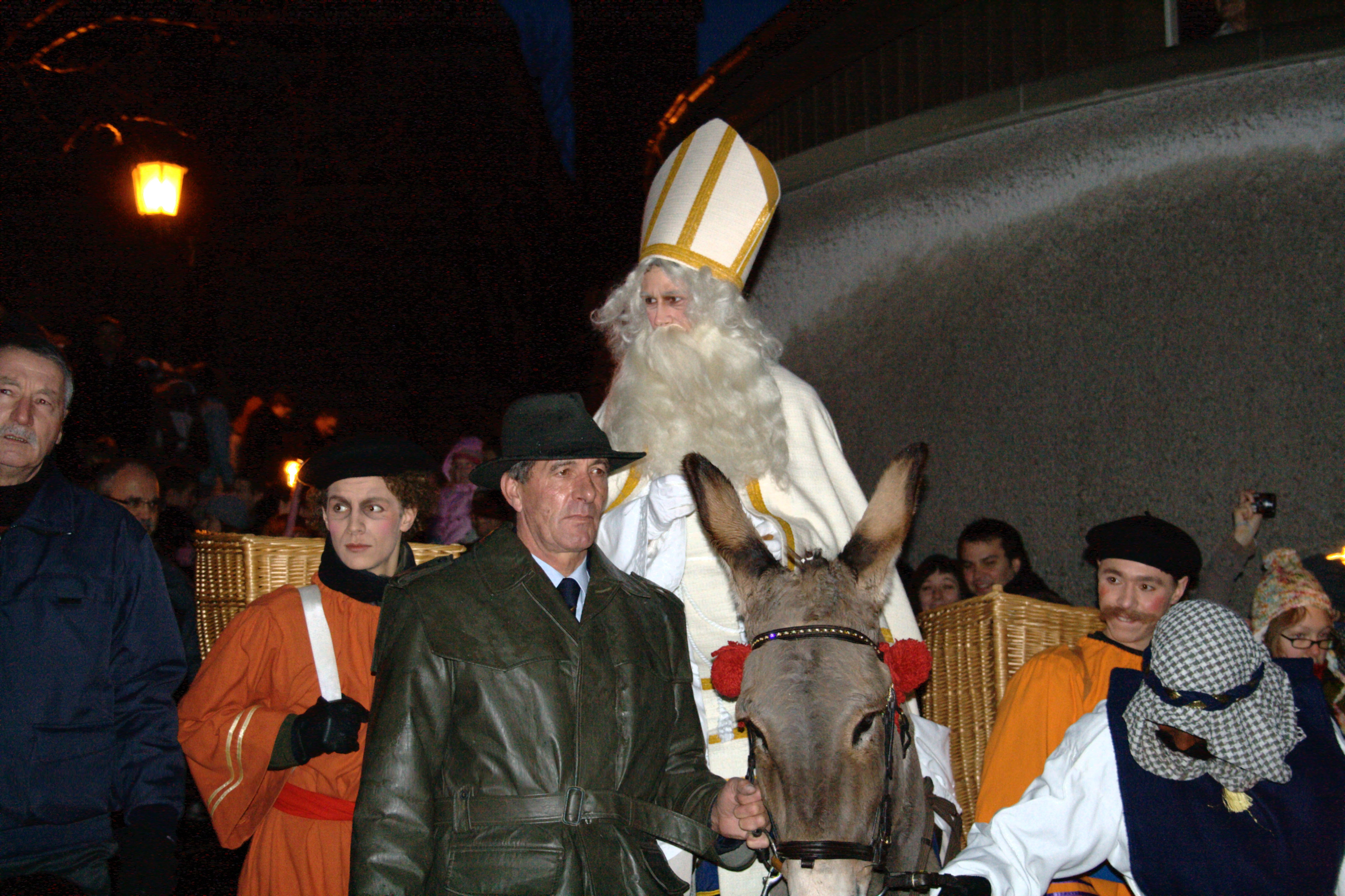 St Nikolaus in Freiburg (CH) am 6. Dezember beim traditionellen Festumzug durch die Stadt